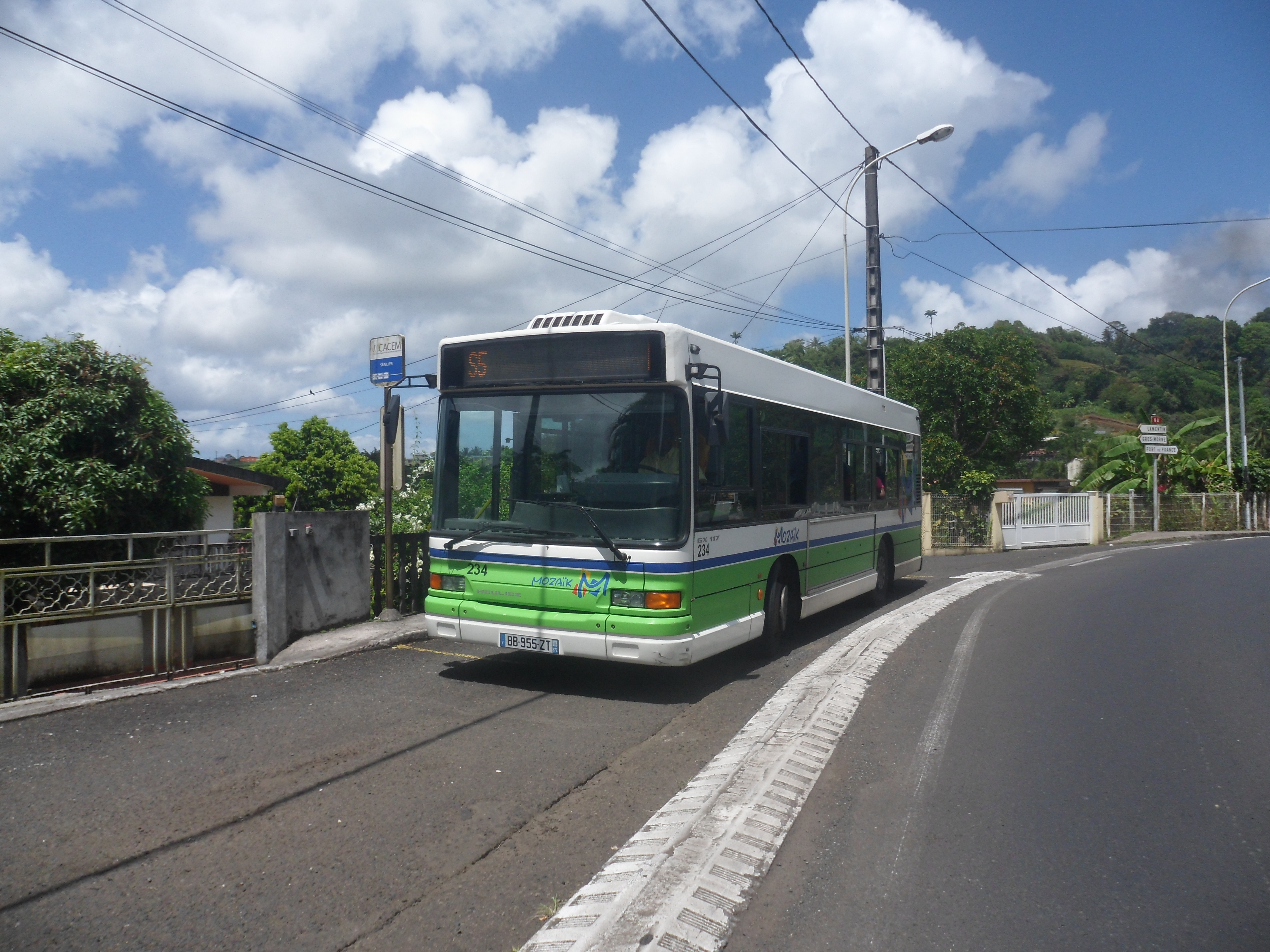 Un GX117 de la ligne S5 Mozaïk, à Saint-Joseph en Martinique.